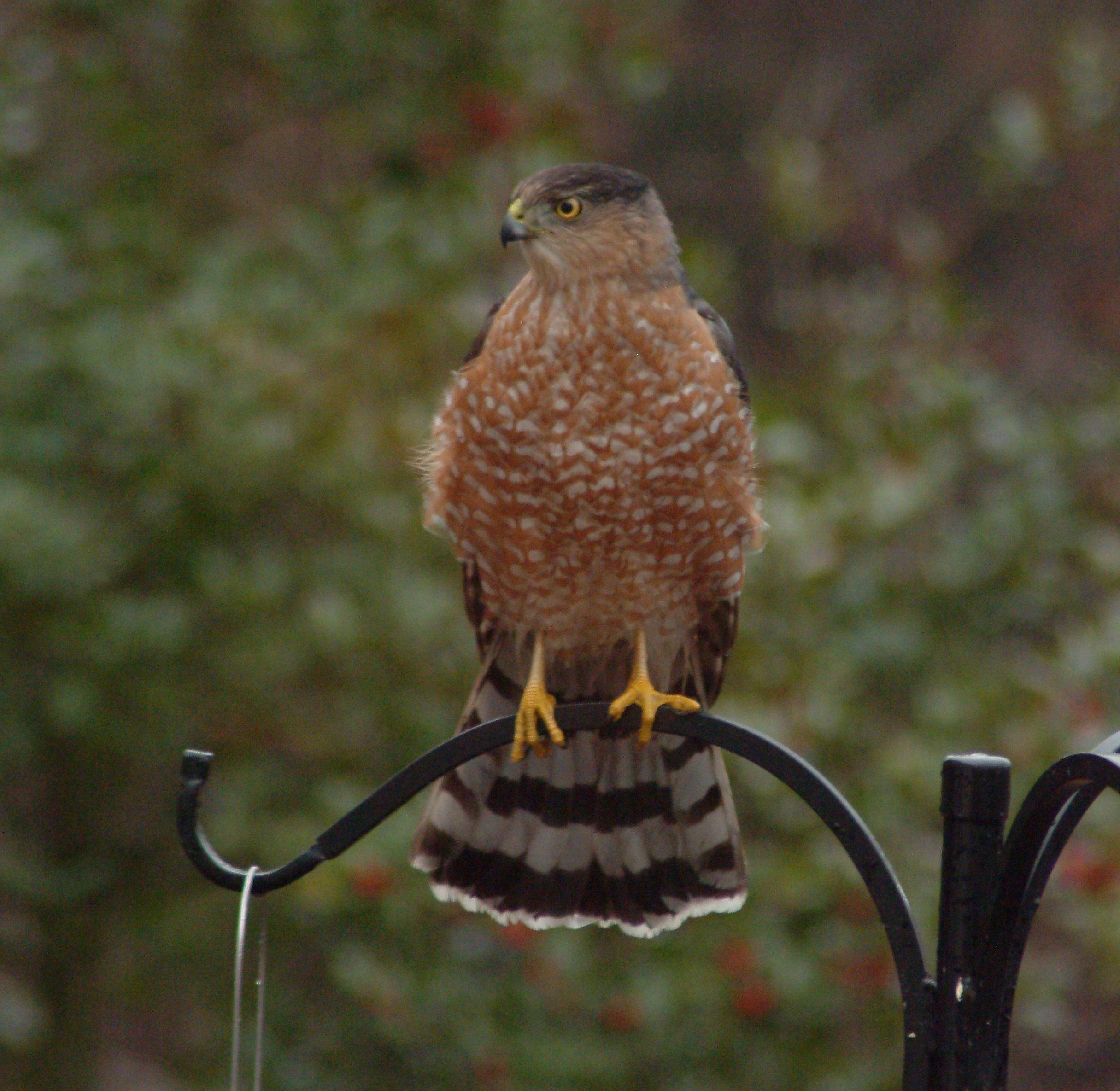 Cooper's Hawk on feeder